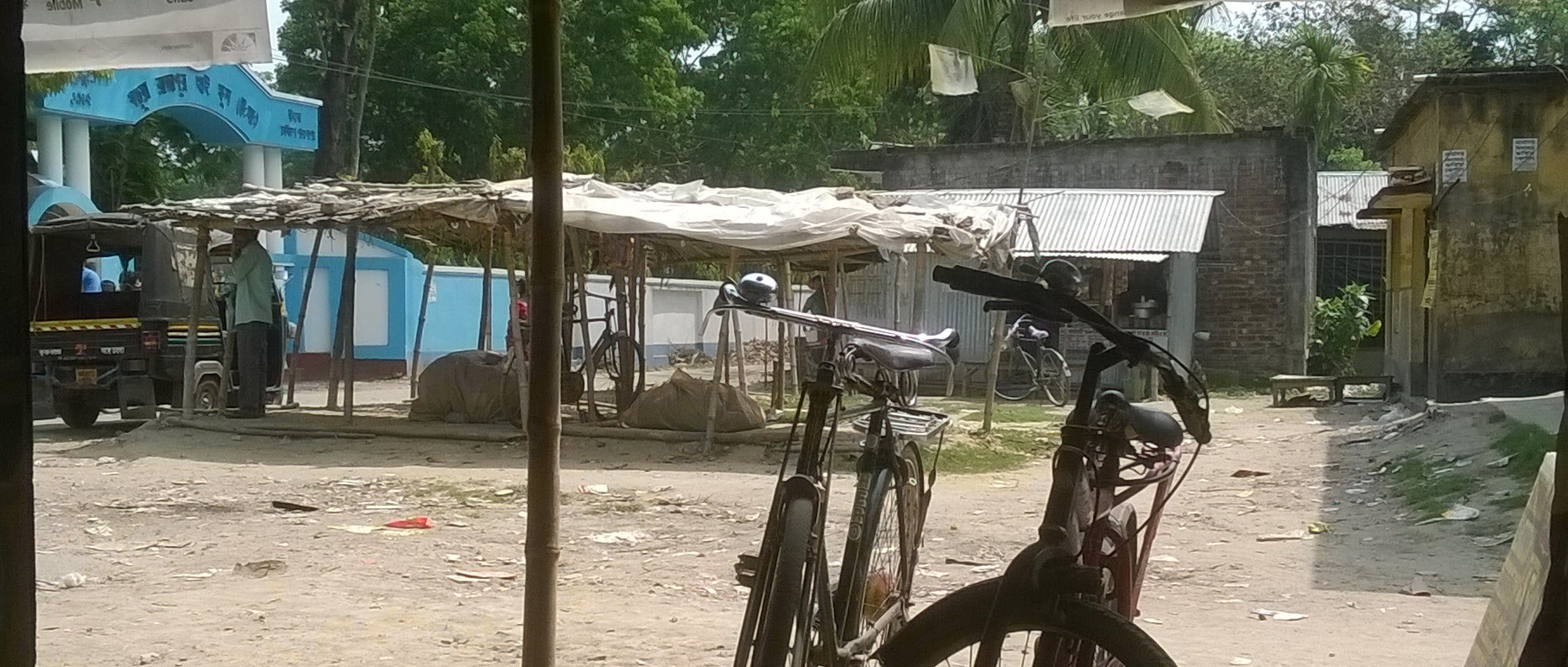 Kharua Rajapur Bazar বাজার